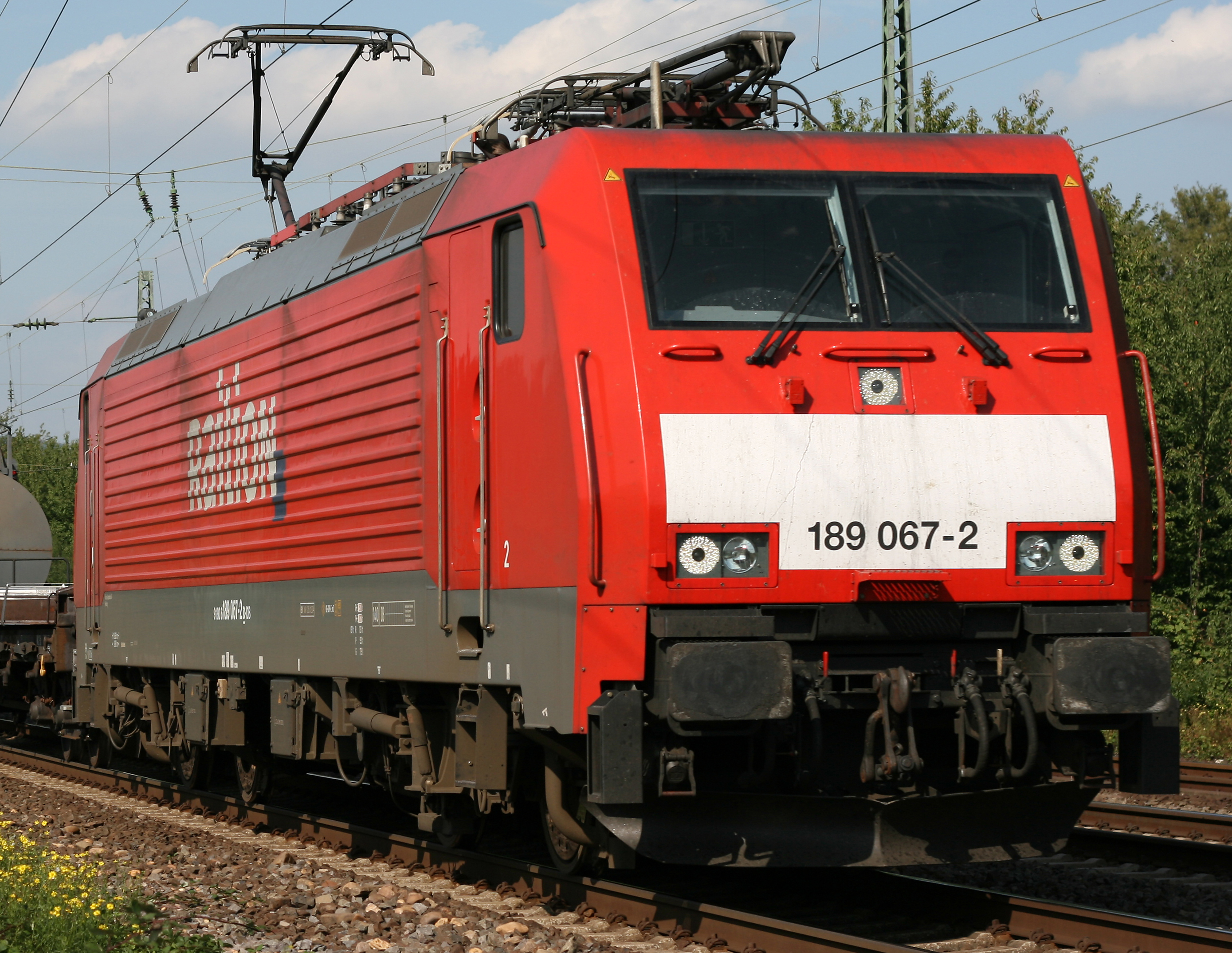 Die Lokomotive 189 067-2 der Baureihe 189 bei Unkel